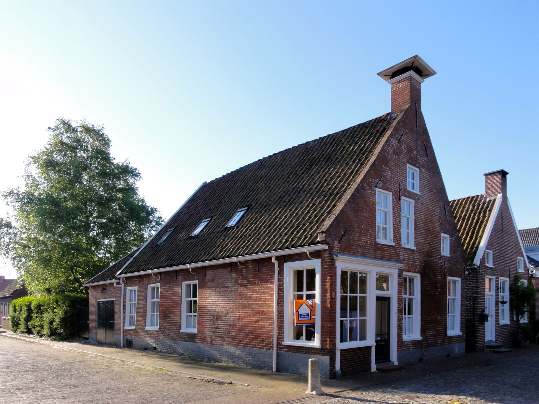 Achterstraat 26 Nieuweschans